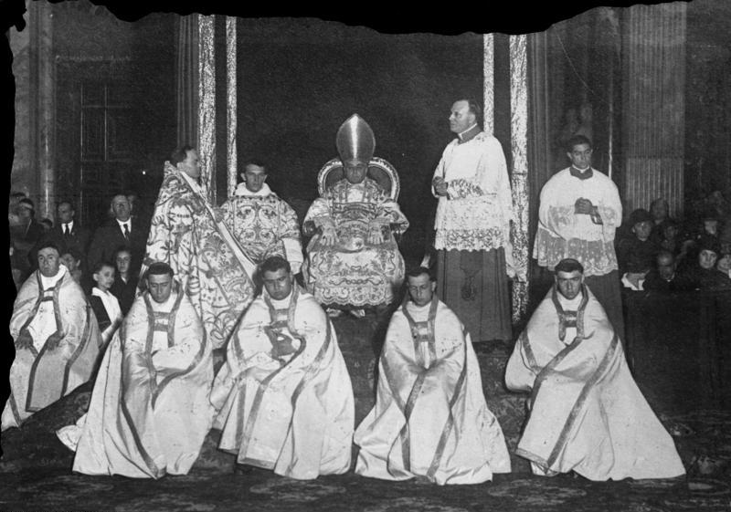 Der Kardinal Staatssekretär Gaspari während einer feierlichen Messe in Rom ! Kardinal Staatssekretär Gaspari erliess bekanntlich einen Brief über die politische Betätigung der Priester. Gaspari [Gasparri] erklärte, dass Priester, sich strikt nach den Vorschriften des Heiligen Stuhles in Rom zu richten haben. Information added by Wikimedia users.*